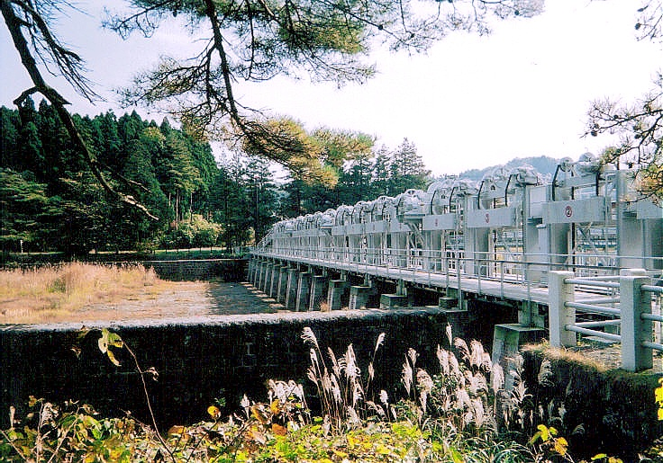 Dam